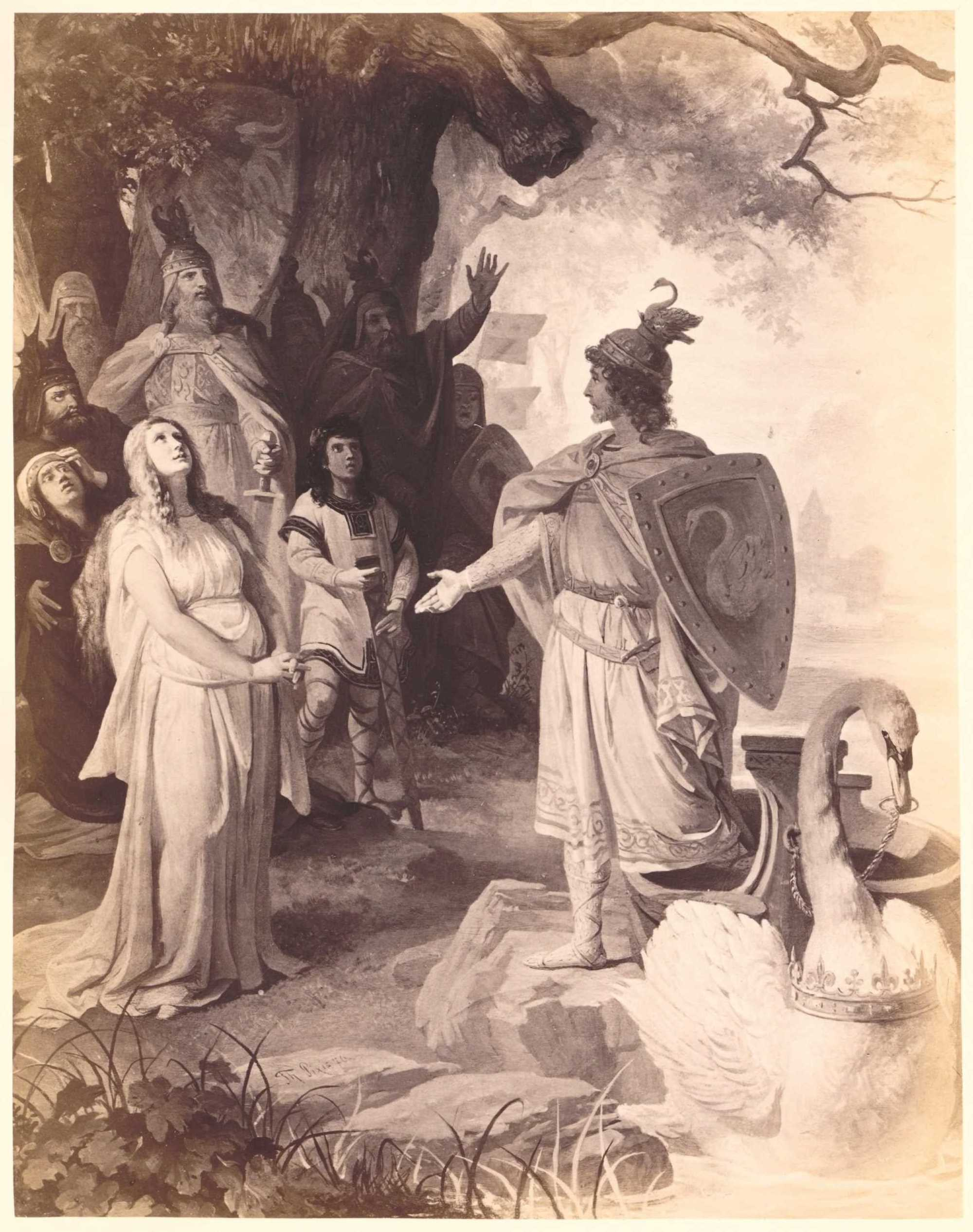 Richard-Wagner-Galerie. Nach den auf allerhöchsten Befehl Sr. Majestät König Ludwig II. von Bayern ausgeführten Cartons von Wilh. von Kaulbach und Theodor Pixis. Photographiert von Jos. Albert. Mit Biographie Richard Wagners und erläuterndem Text von Wilhelm Tappert. Berlin, Verlag von Hanfstaengl’s Nachfolger. Blatt: Lohengrin’s Ankunft